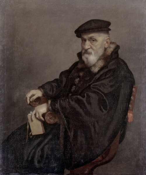 Bildnis eines Senators